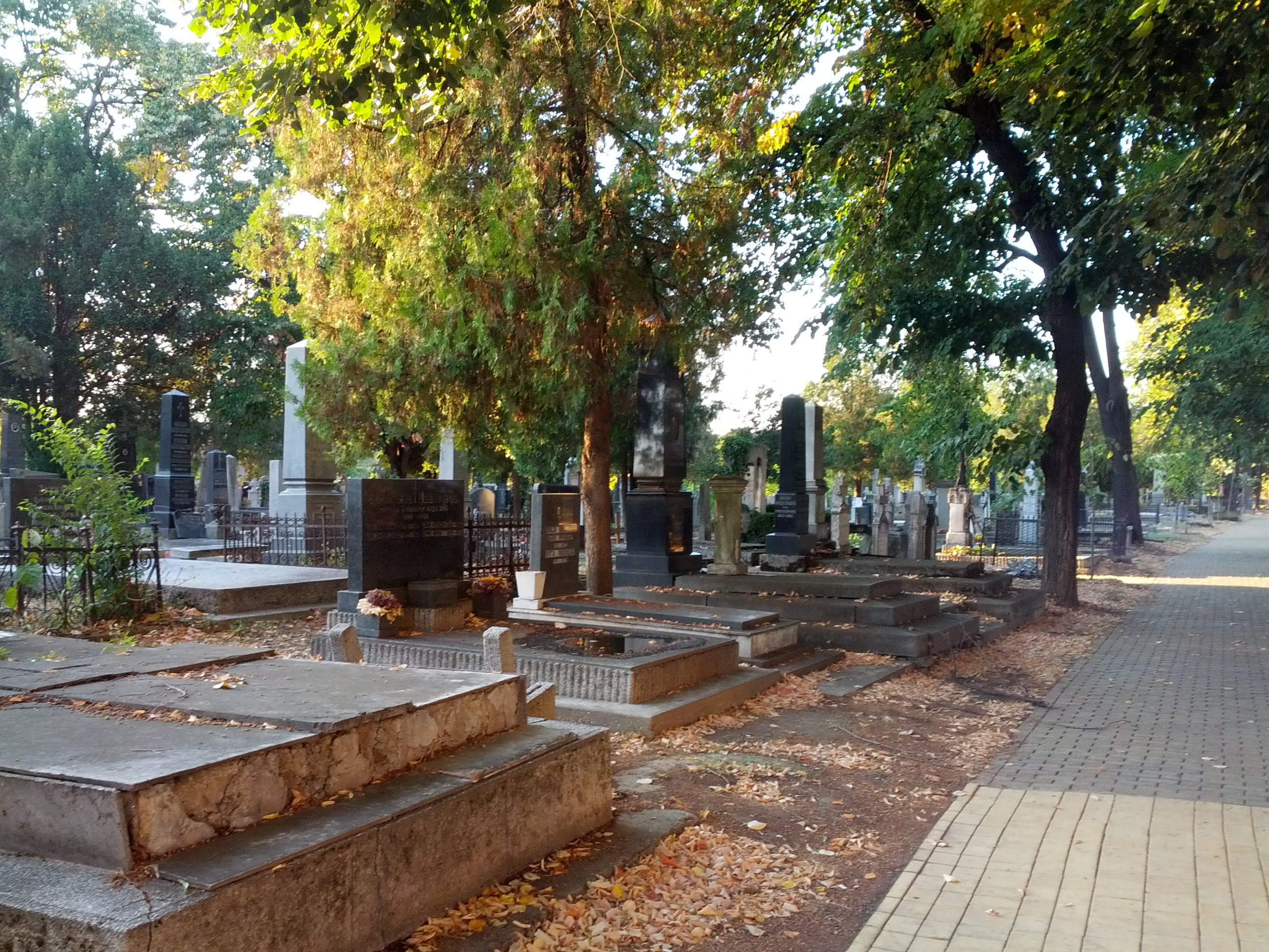 Двадесет и четири надгробна споменика са гробним местима истакнутих политичких, културних и јавних радника